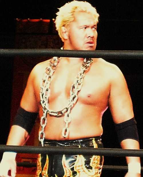 2015年3月22日 ベイコム総合体育館「Road to INVASION ATTACK 2015」真壁刀義